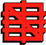 logotipo homeostético